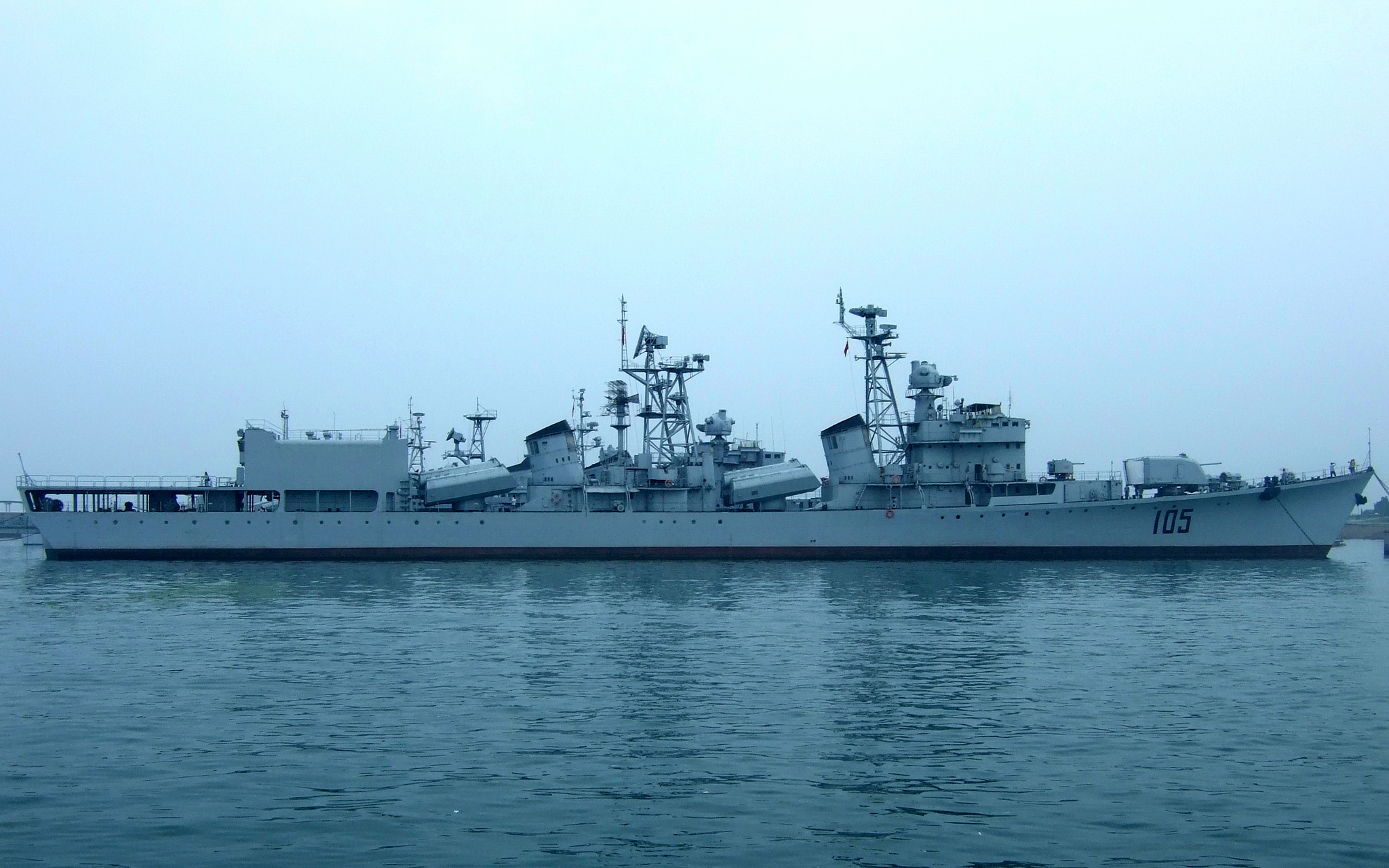 中文（中国大陆）: 051型(旅大级)导弹驱逐舰济南号（舷号105）退出现役后存放于青岛海军博物馆